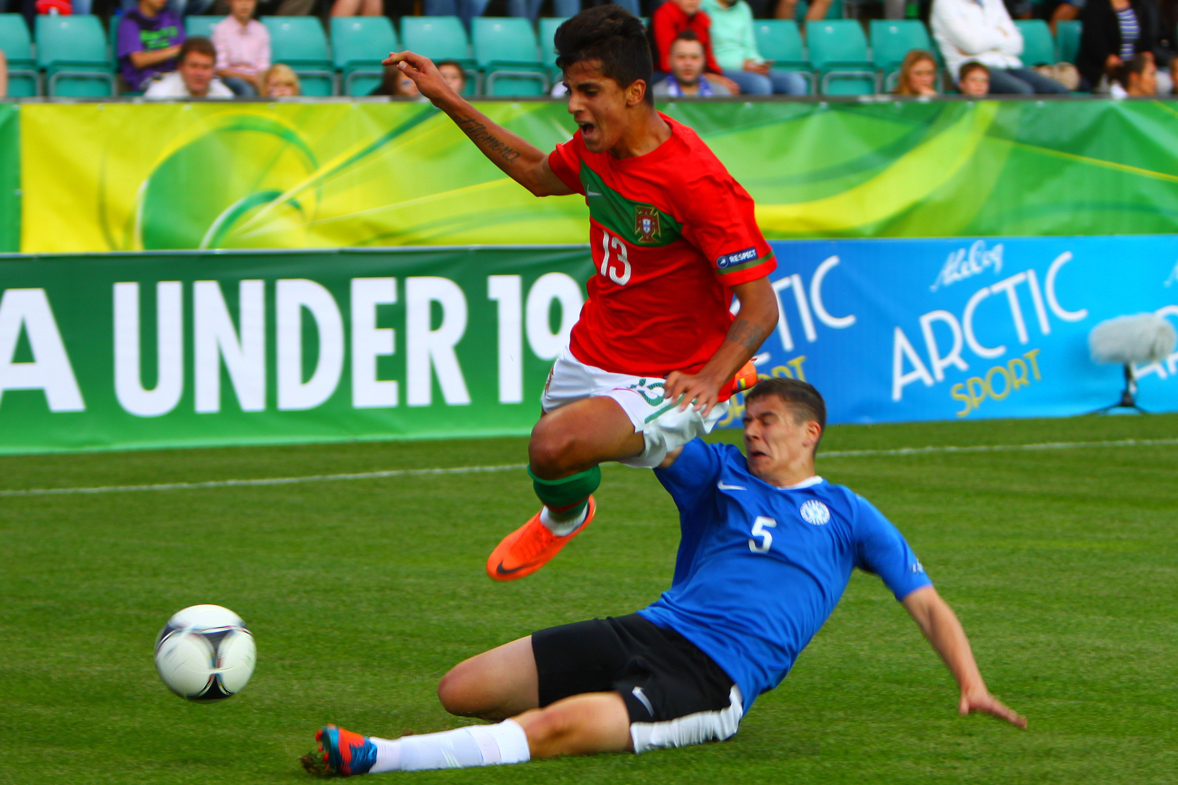 Artur Pikk tackles João Cancelo.